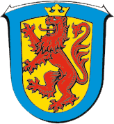 Wappen von Ulrichstein